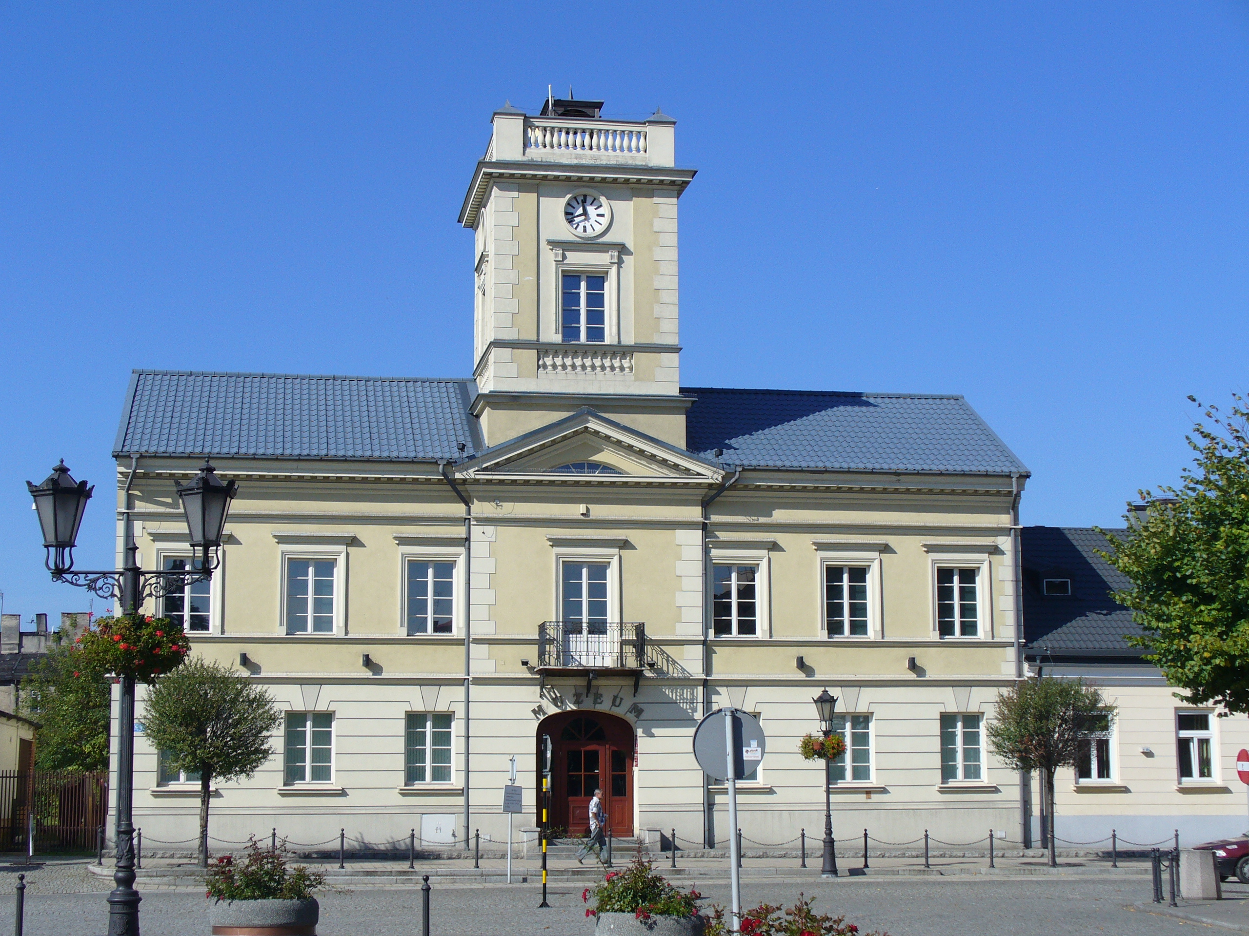 Kutno,Ratusz, mur., 1 poł. XIX